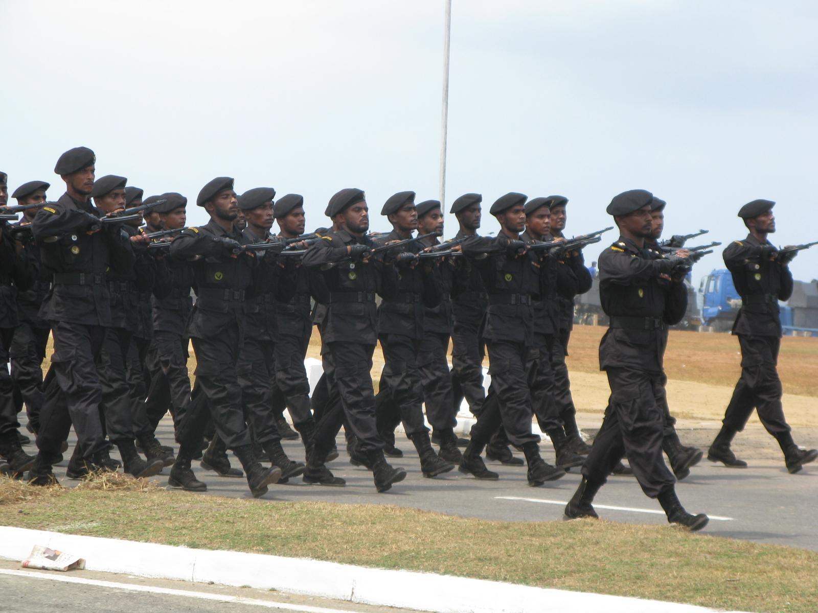 Sri Lanka Army